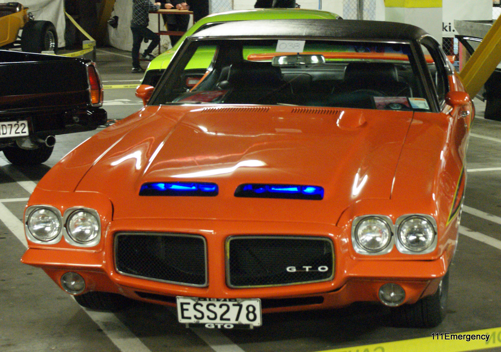 1971 Pontiac GTO